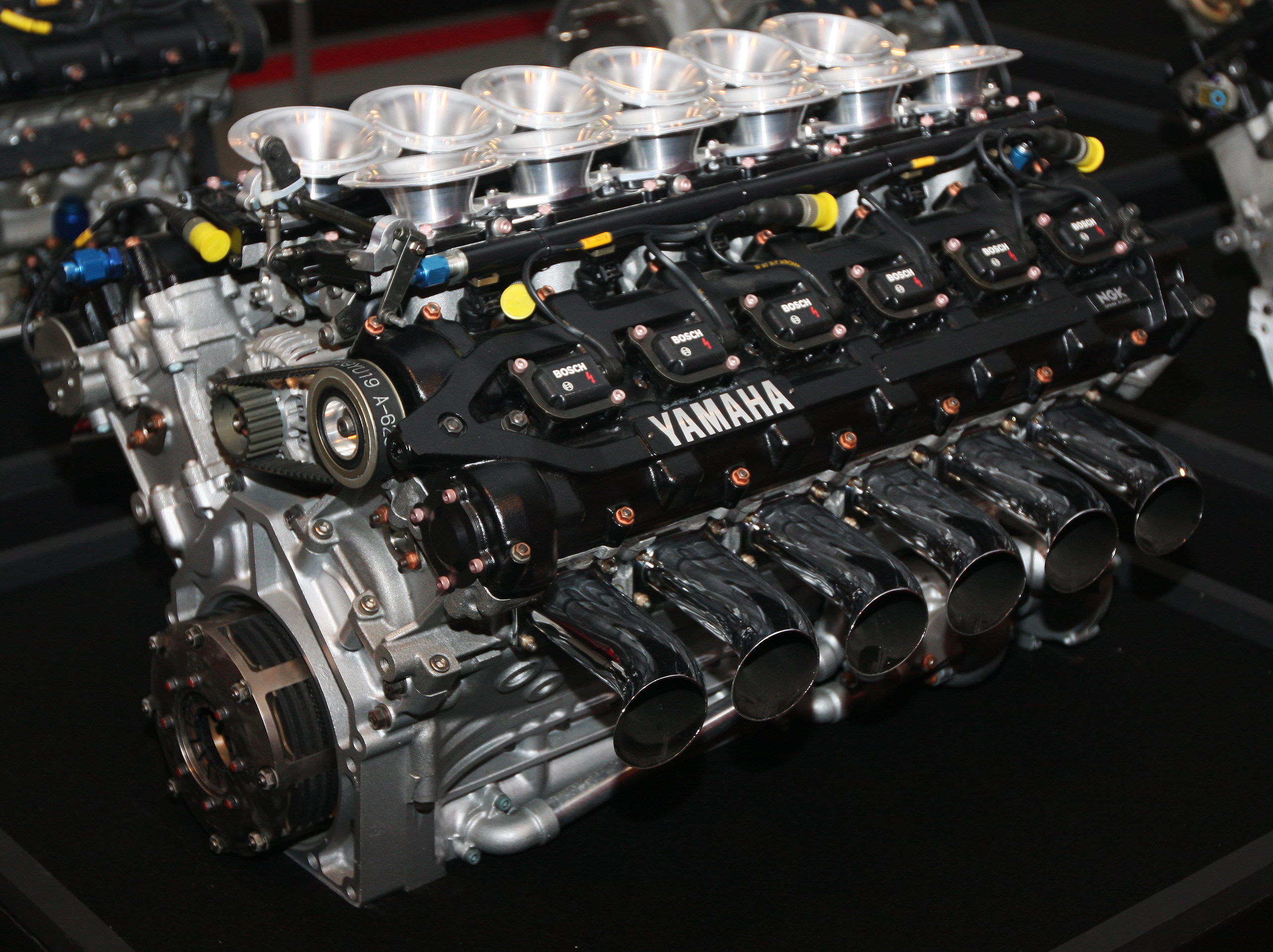 1992 Yamaha OX99 engine